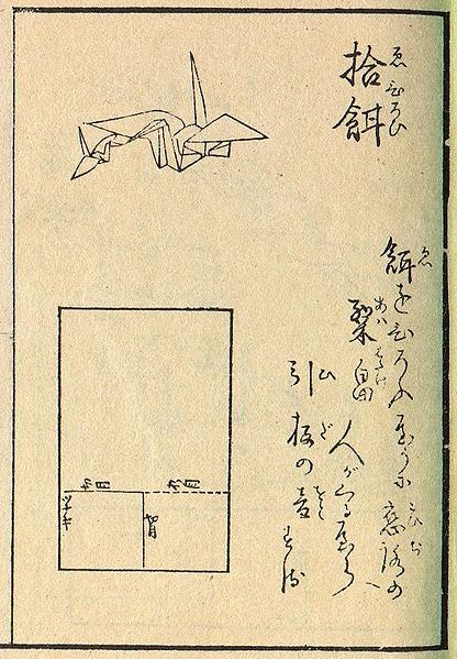 義道一円（ぎどういちえん）『秘傳千羽鶴折形』（1797年）より「拾餌（えひろい）」